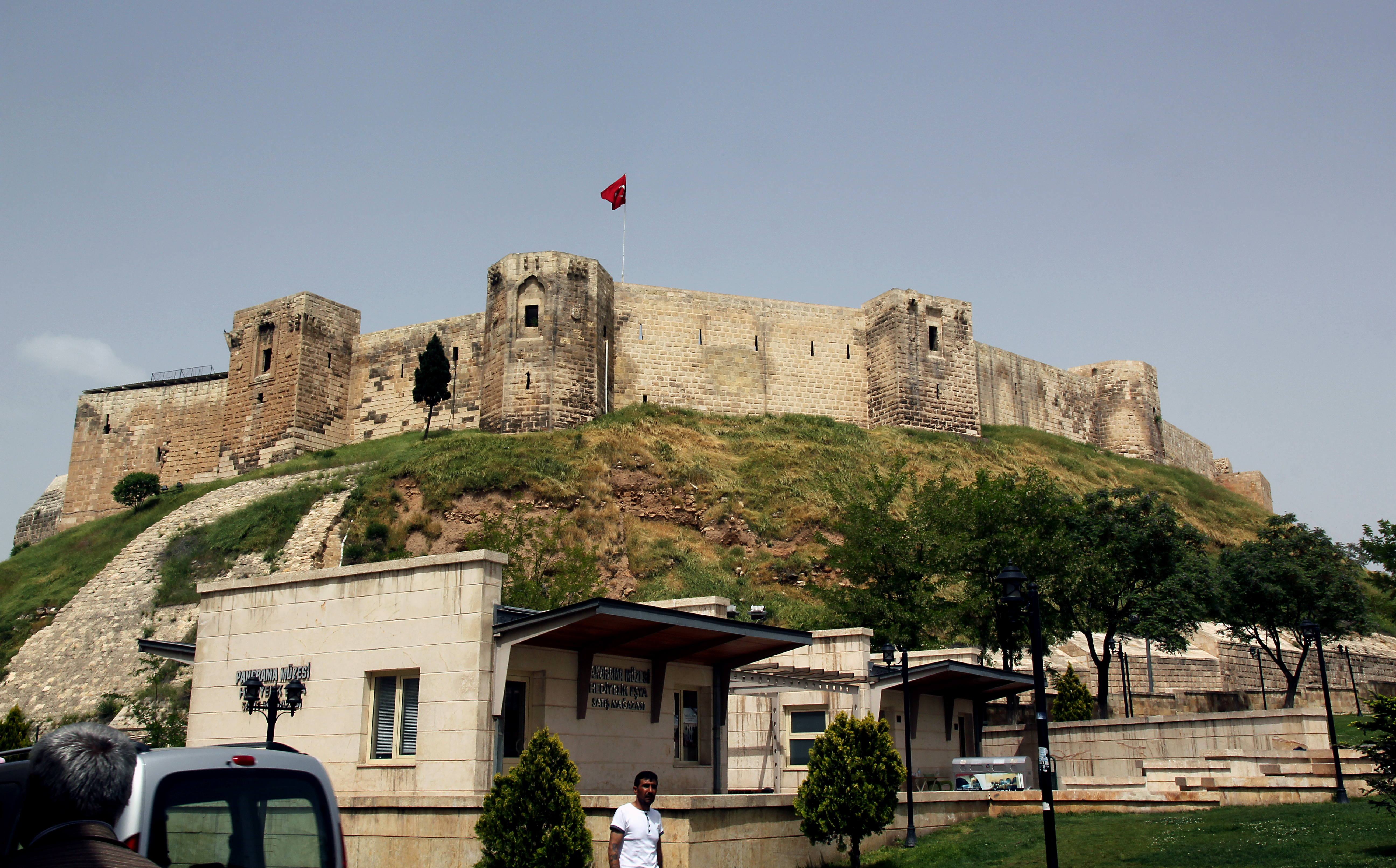 Festung von Gaziantep, Türkei